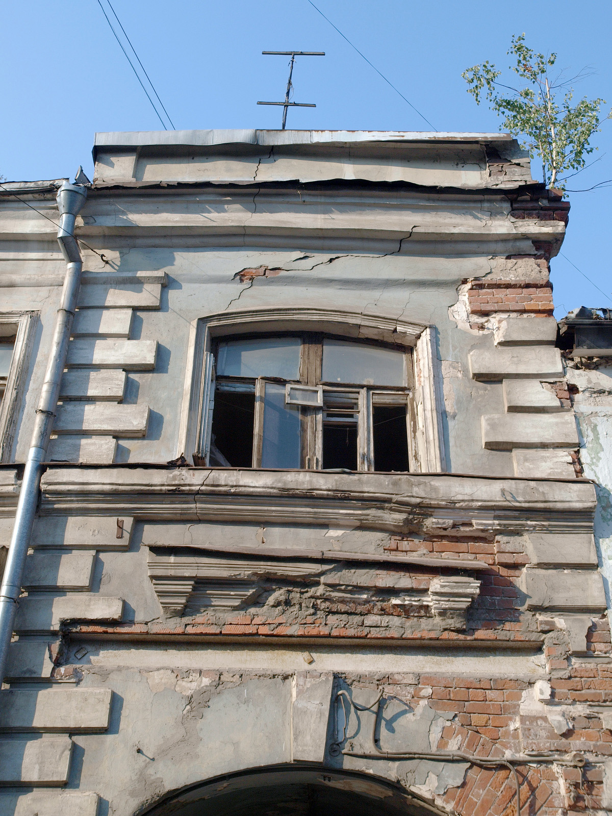 Печатников переулок, Москва.